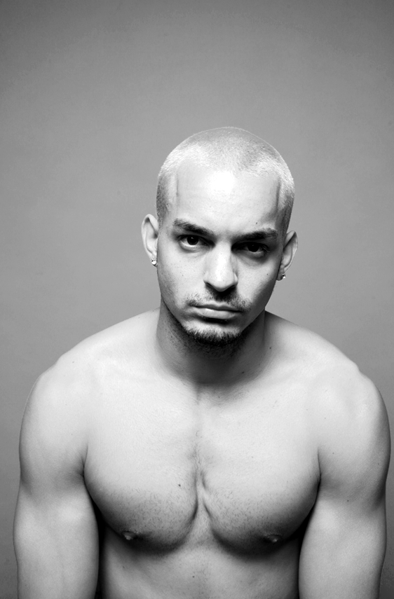 Porträt von Ricco Müller